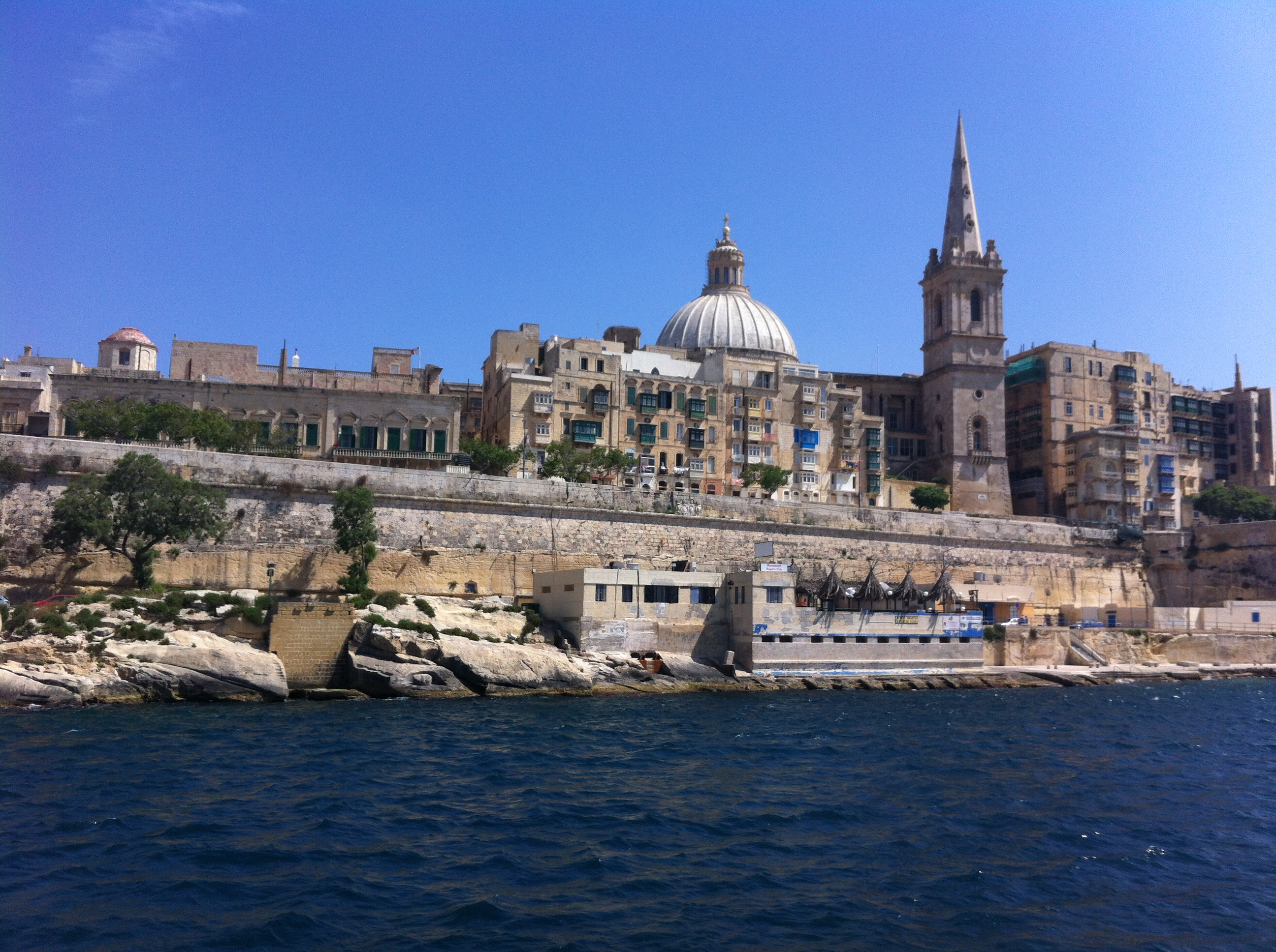 Boat Street, Valletta, Malta